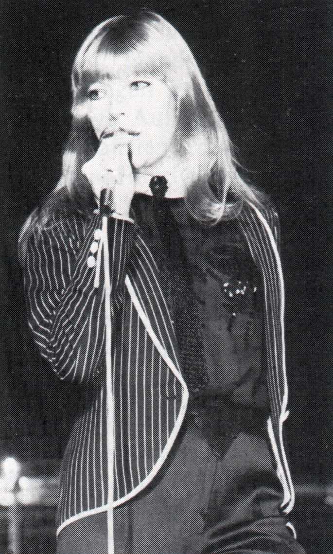 Die Sängerin Katja Ebstein bei einem Auftritt anlässlich der Modenschau des Frankfurter Kürschnermeisters Helmut Feilitsch im Einrichtungshaus Häcker am Buß- und Bettag 1980.